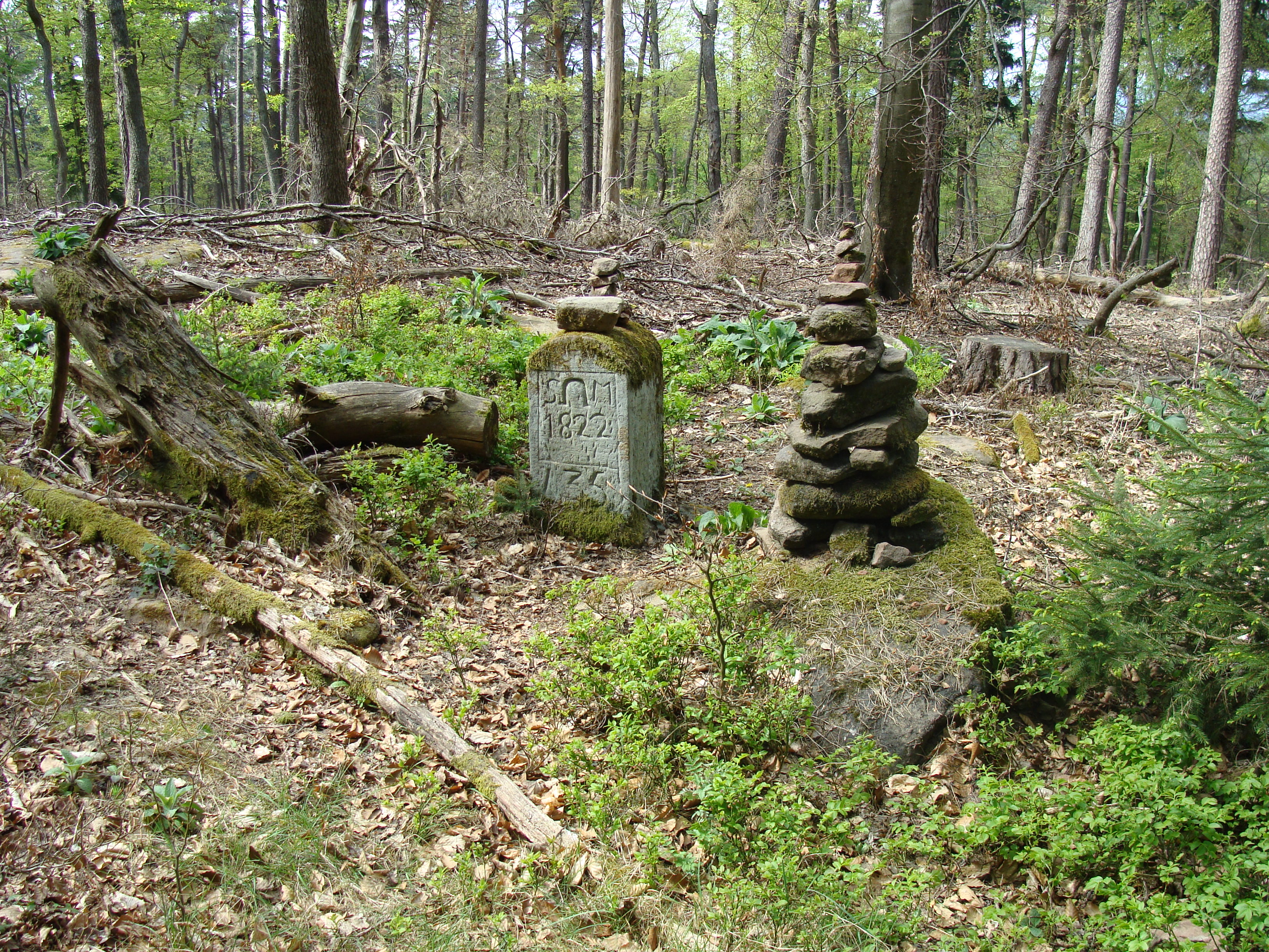 Gipfel des Schafkopf (Haardt/Pfälzerwald)